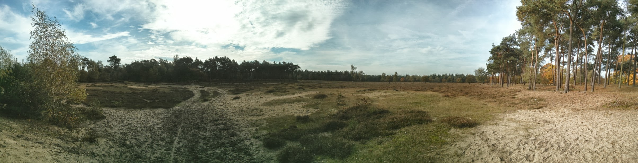 Zicht op een deel van natuurgebied de Herperduin. Niet ver gelegen van Oss en Herpen